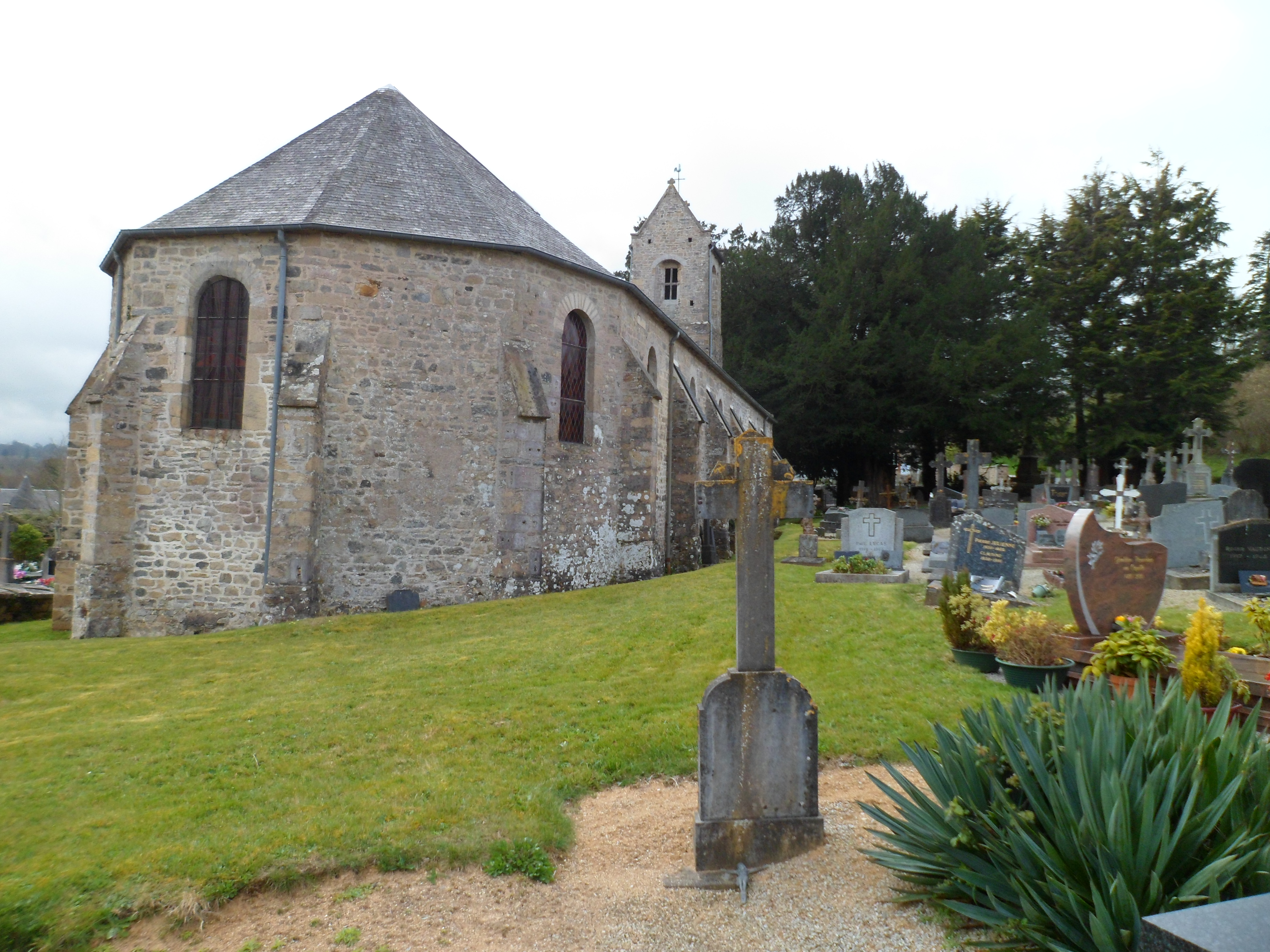 Église Saint-Martin de Montcuit